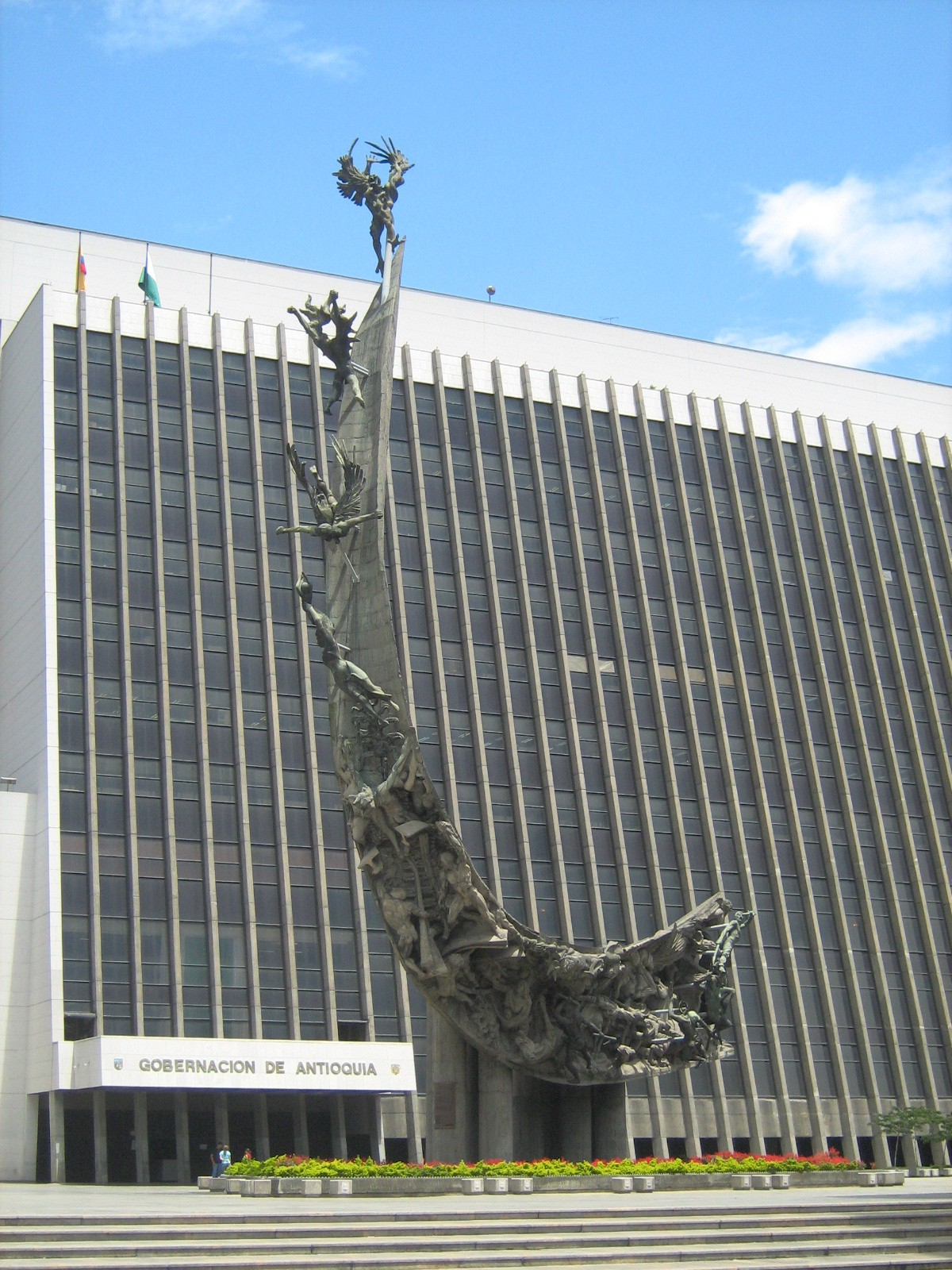 1979 - 1986 Monumento a la Raza, bronce y concreto, 38 m de alto, obra del maestro Rodrigo Arenas Betancourt. Localizado en el Centro Administrativo de La Alpujarra, Medellín, Colombia